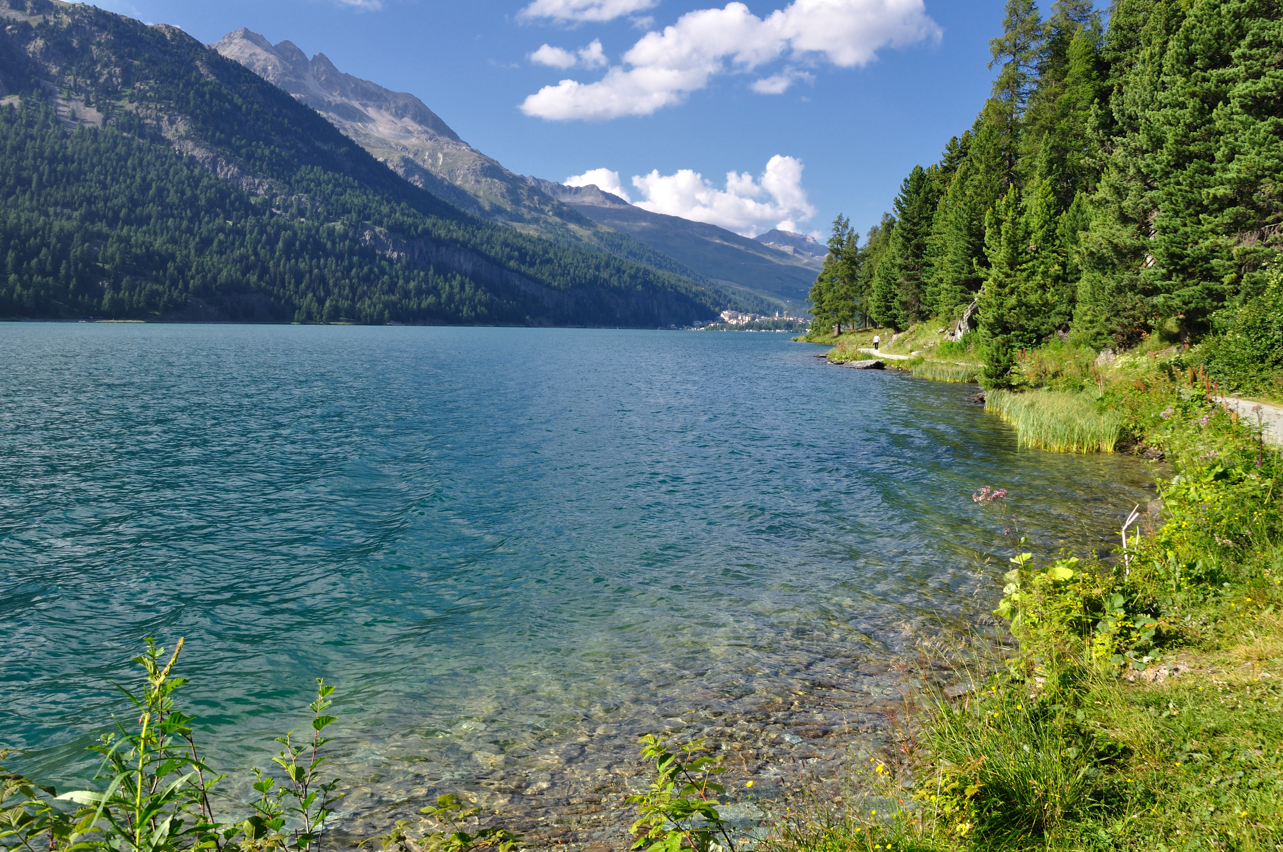 Switzerland, Graubünden, walk along Lake Silvaplana